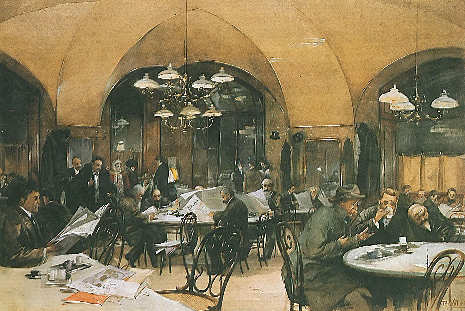 Café Griensteidl in Vienna